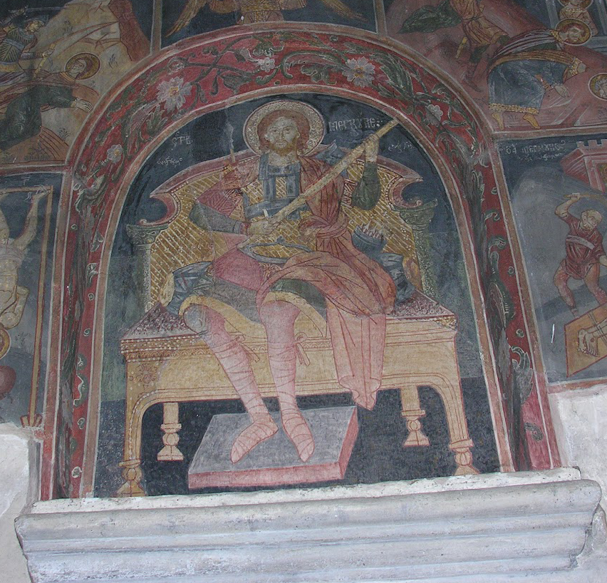 Manastirea Plataresti - Pictura pronaos - Sfântul Mercurie